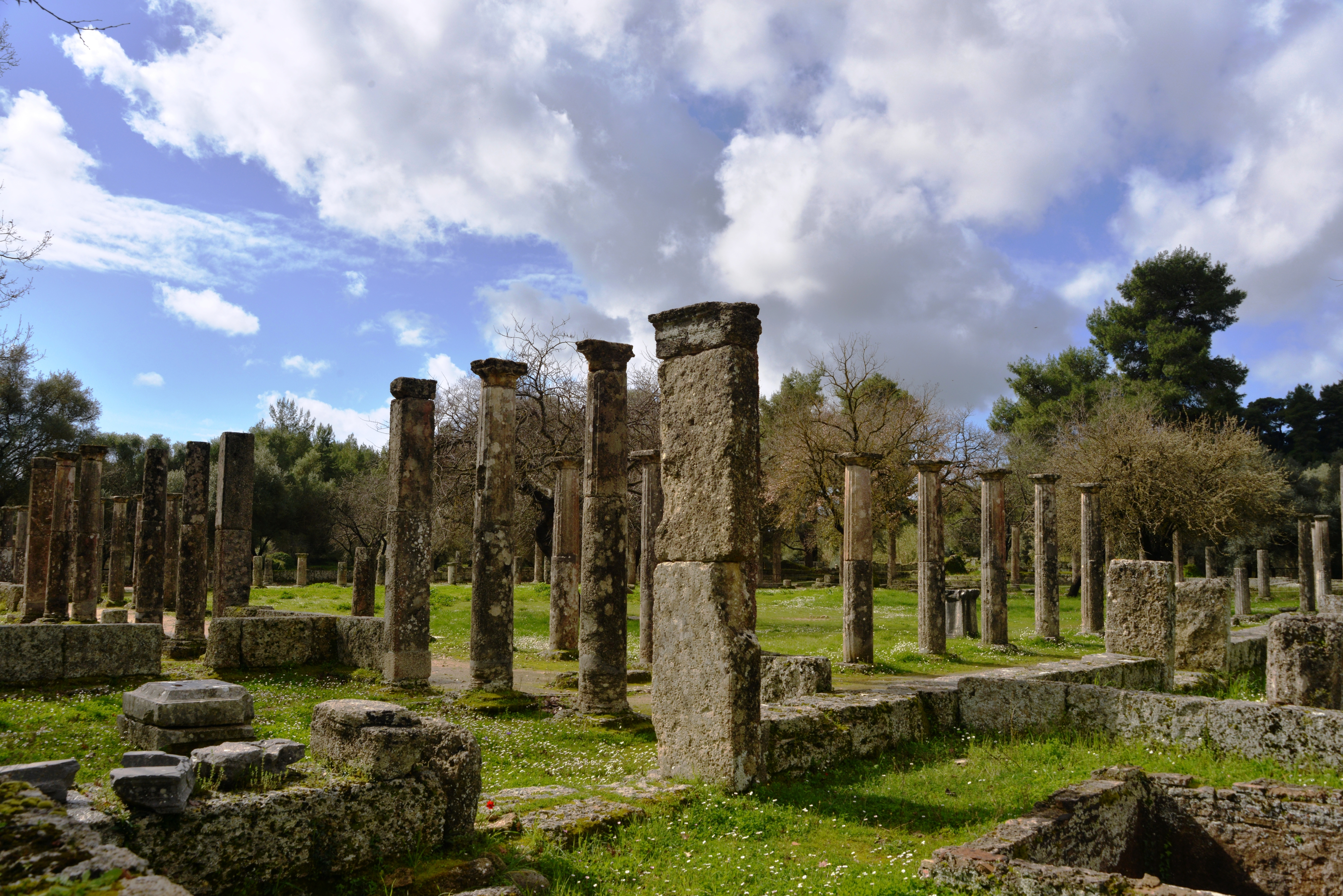 Παλαίστρα Ολυμπίας«Παλαίστρα Ολυμπίας»